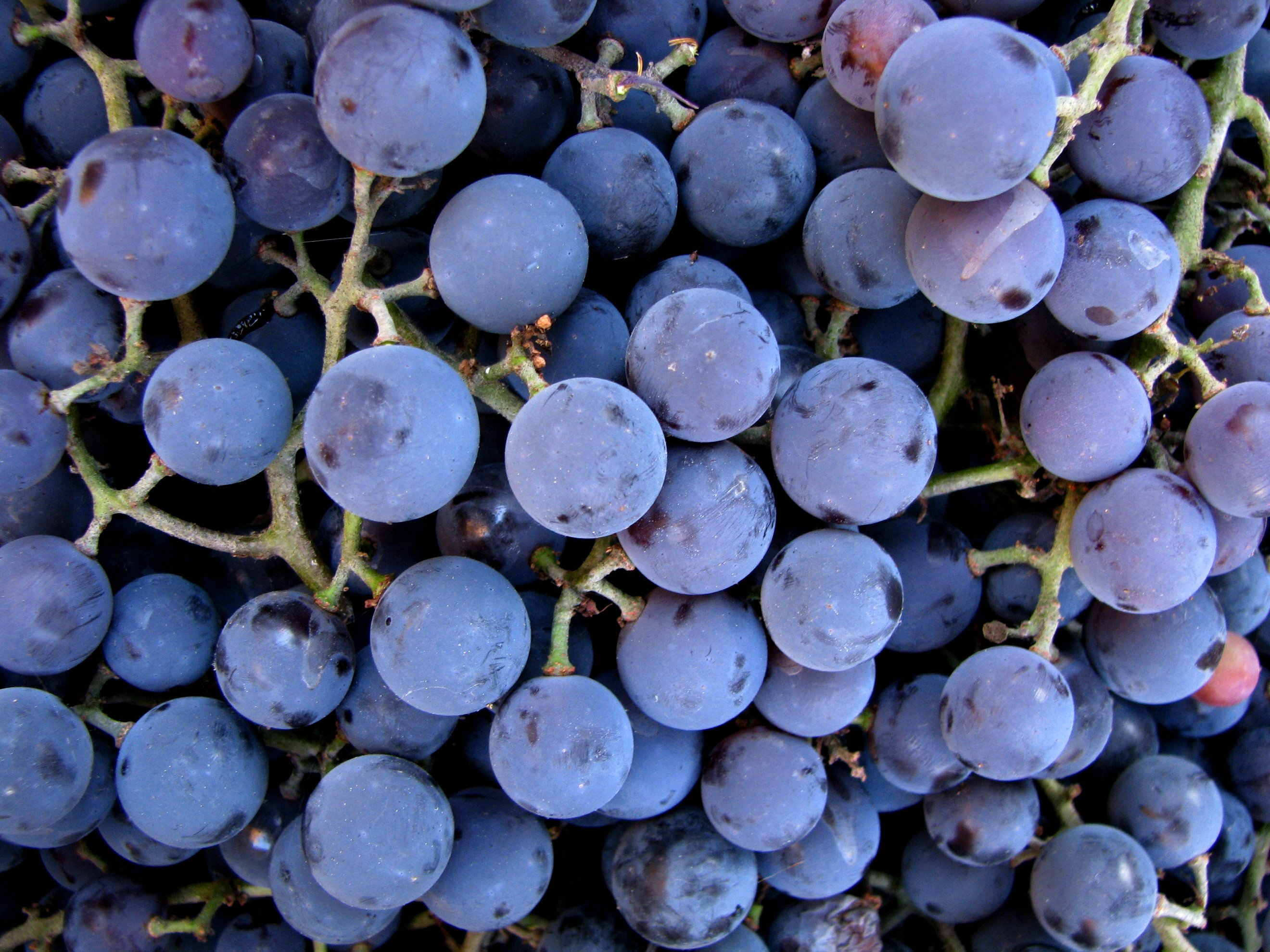 Grapes